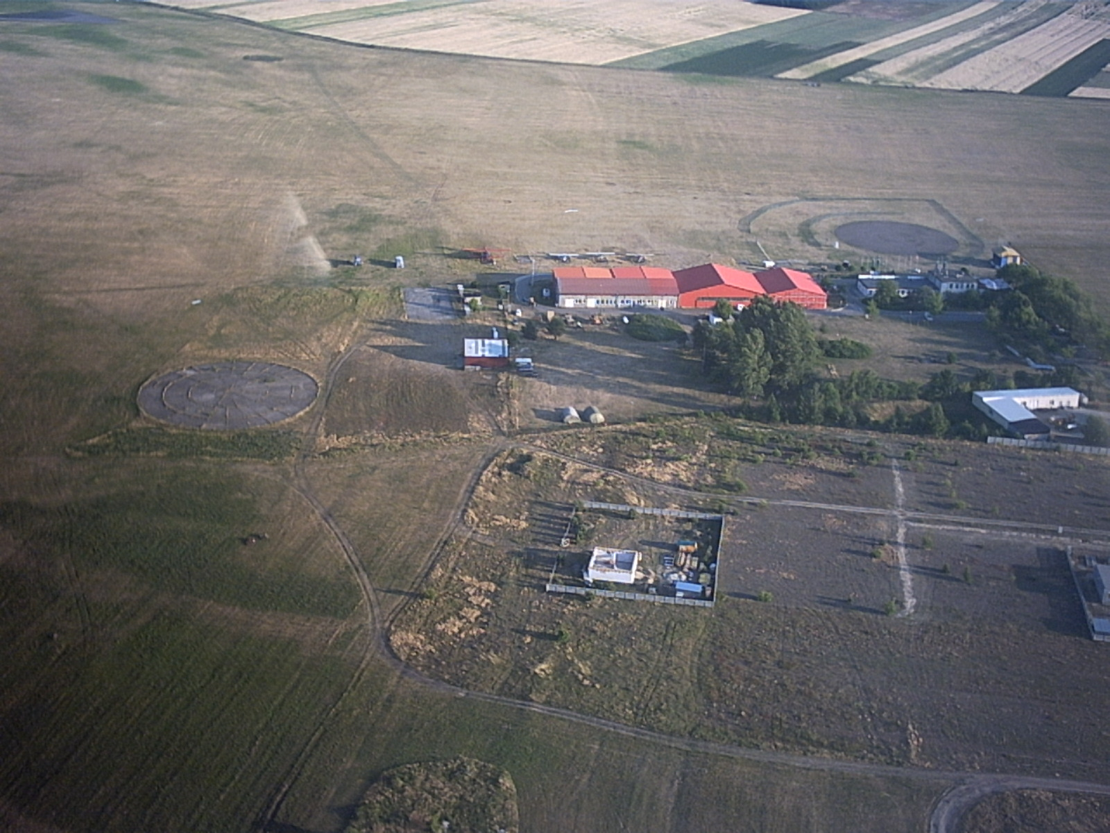 Włocławek, Kruszyn, Lotnisko, samolot, szybowiec, Aeroklub